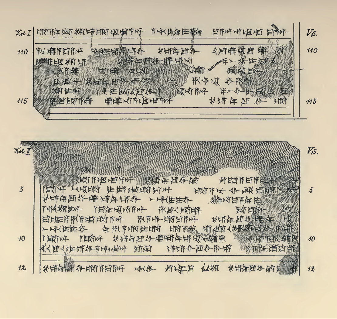 List Tuszratty do Amenhotepa III w języku huryckim – autografia.